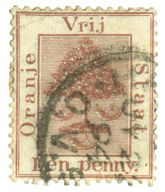 Een postzegel van 1 penny van Oranje Vrijstaat, eigen postzegel, zelf ingescand, meer dan 100 jaar oud